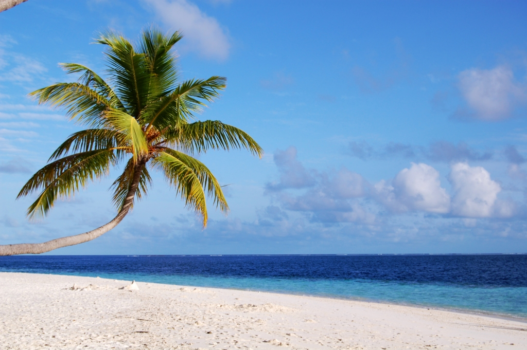 Maldives